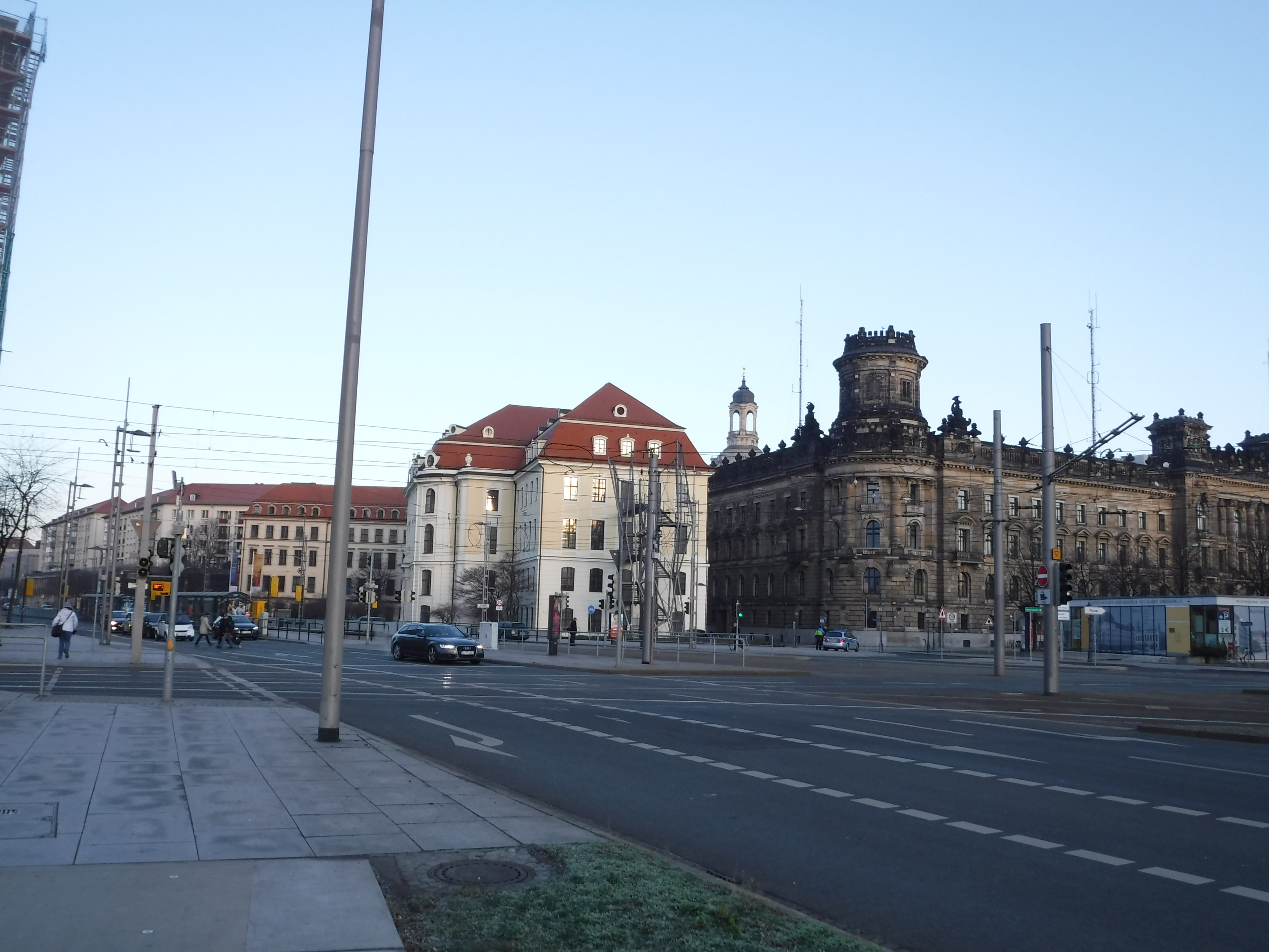 Pirnaischer Platz in Dresden mit Landhaus und Polizeiwache